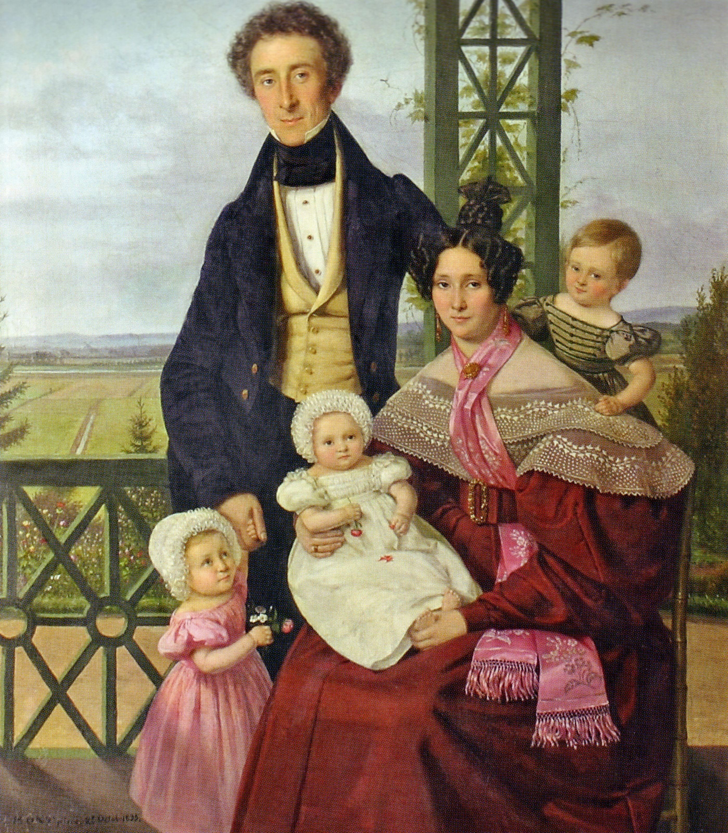 Portrait des Ludwig Aumont „Justus Carl Wilhelm Ruperti (1791-1861) und Familie“ Marie Pauline Ruperti, geb. Merck (* 20. März 1808 in Hamburg; † 23. März 1861 ebenda) Justus Carl Wilhelm Ruperti (* 29. Oktober 1791 in Stade; † 3. November 1861 in Hamburg) mit drei Kindern (vermutlich Heinrich Alexander (* 10. Mai 1832), Emma (* 3. Juli 1833) und Karl Justus (* 8. Januar 1835))